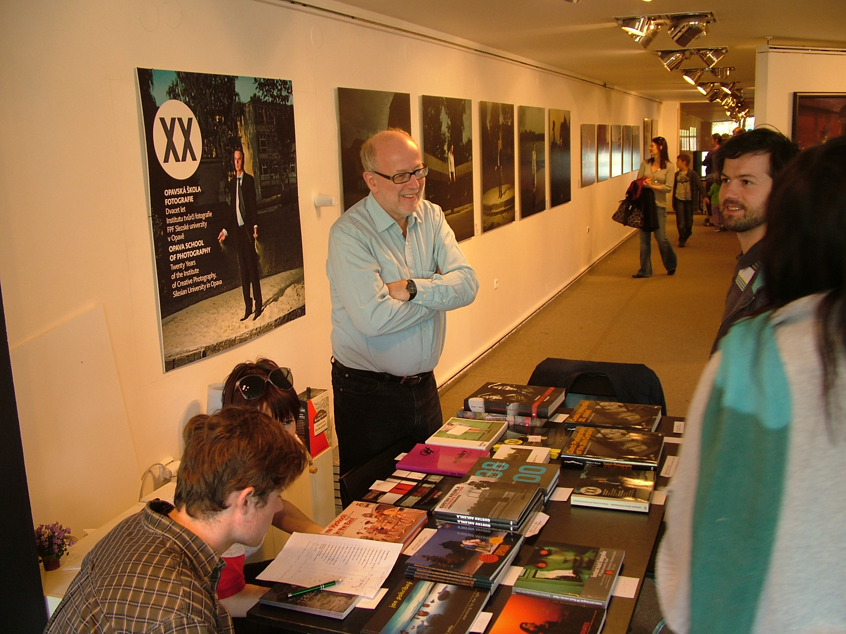 Výstava, festival, Prague Photo 2011 Budova: Mánes, Praha Trvání: od 4. dubna do 10. dubna 2011. Datum: 10. dubna 2011.